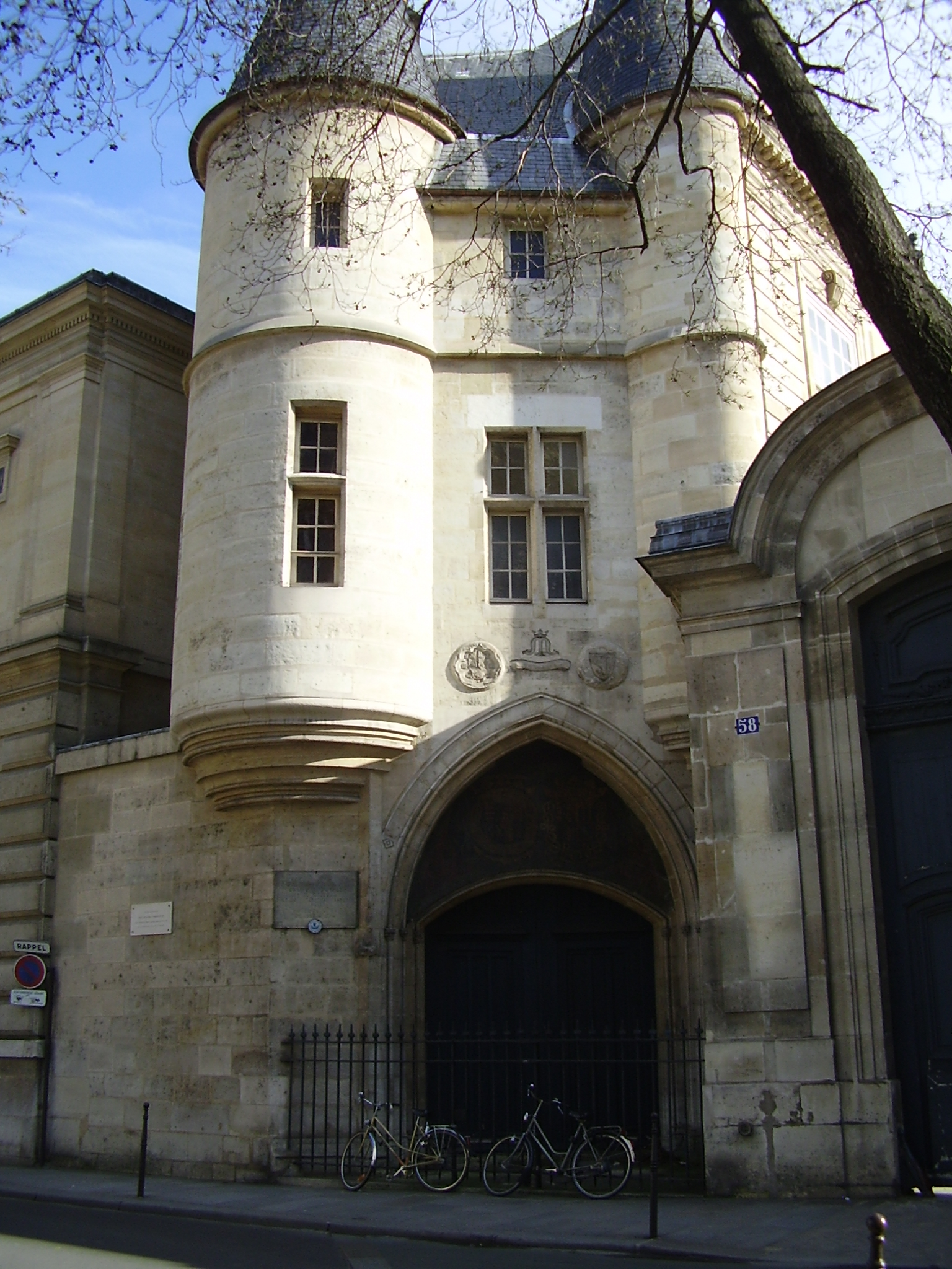 Portail de l'ancien Hôtel de Clisson, 58 rue des Archives, dans le Marais à Paris (IIIe arrondissement). Ce portail, seul vestige de l'ancien hôtel particulier d'Olivier de Clisson, date de la fin du XIVe siècle.